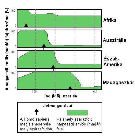 Extinctions Africa Austrailia NAmerica